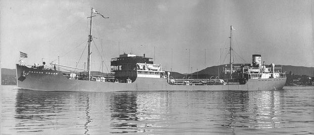 M/T Haakon Hauan